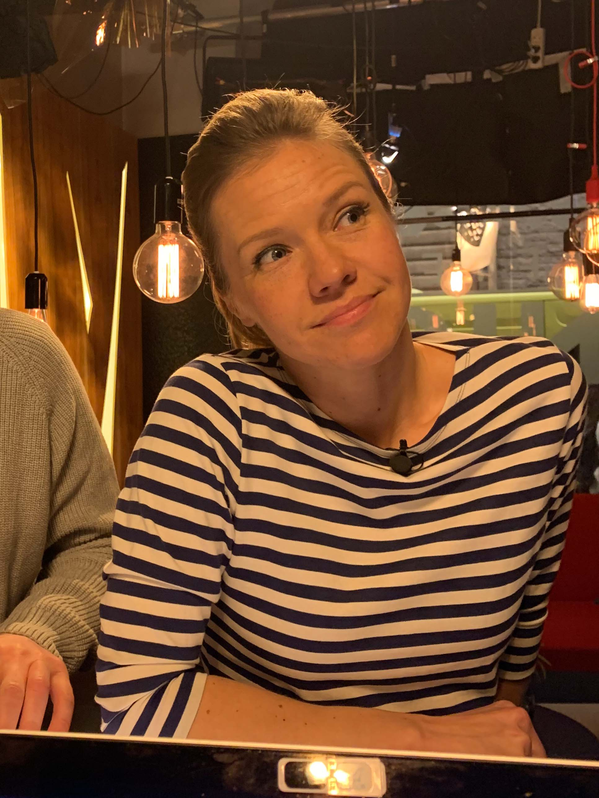 Sonja Kailassaari under inspelning av programmet för 15.4.2019